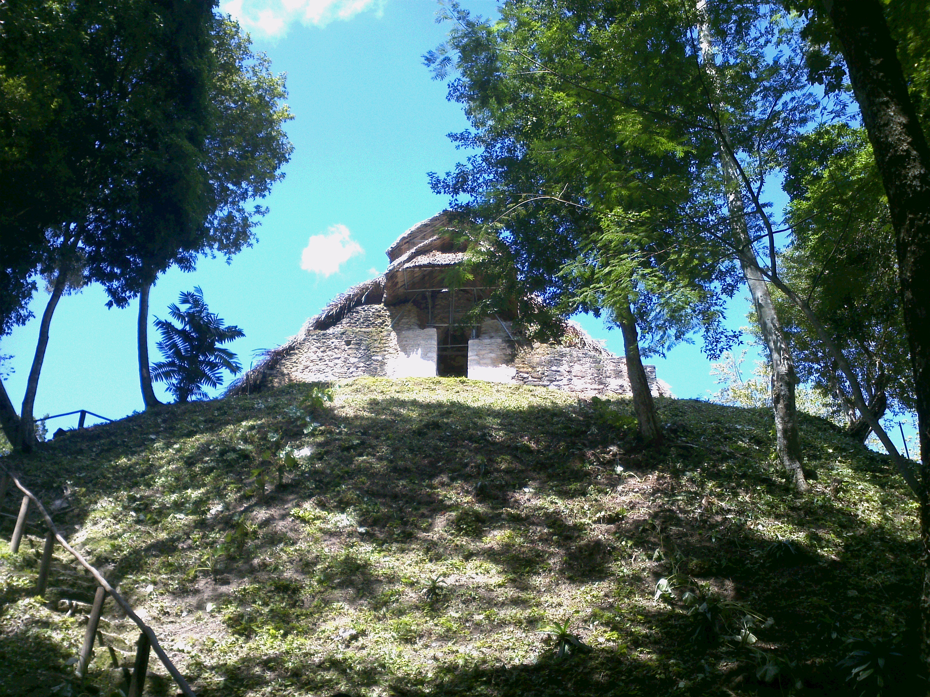 fotografia de las estructuras en proceso de restauración sitio arqueologico el naranjo saal Melchor de Mencos Peten, Guatemala